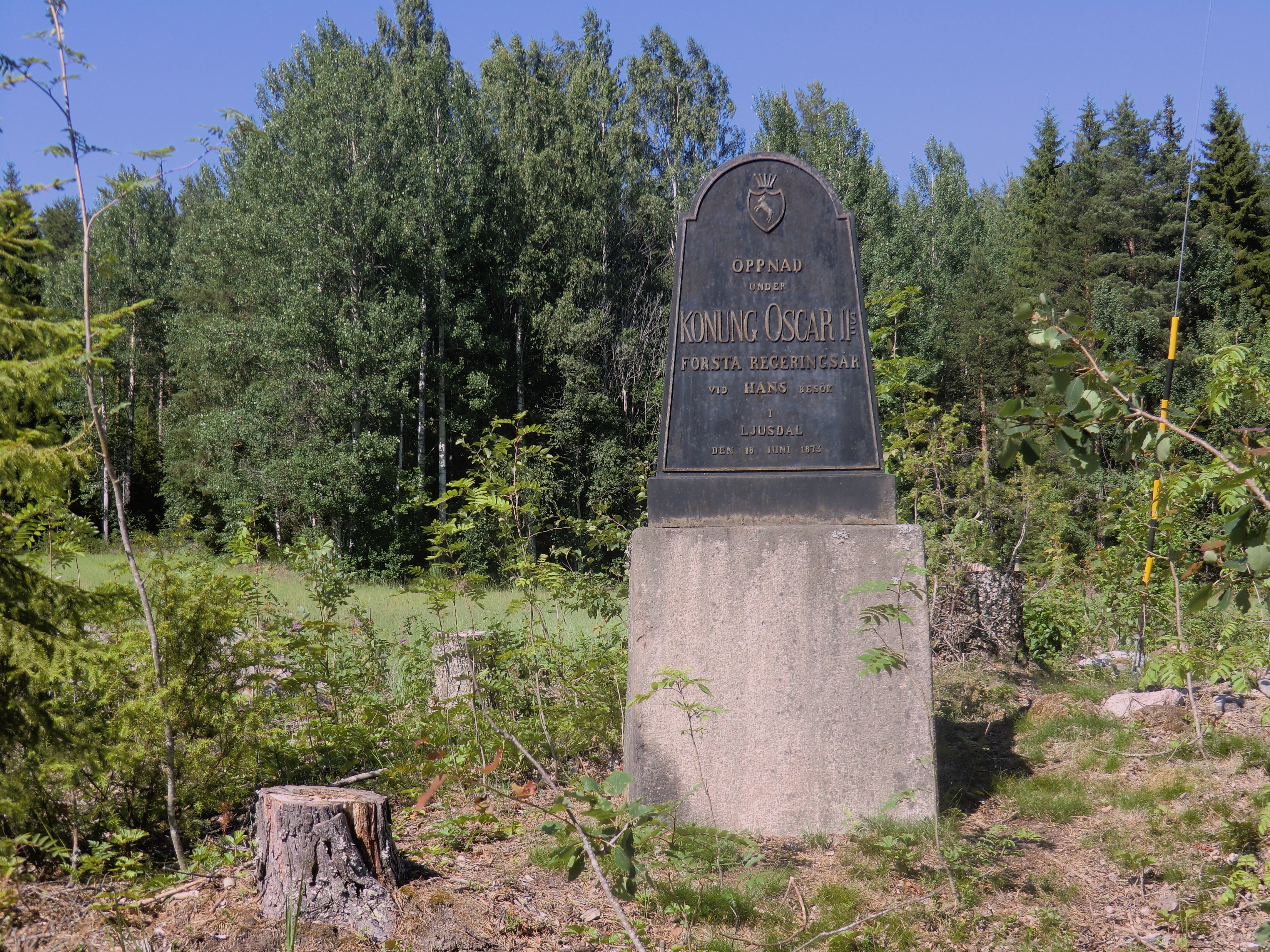 Minnessten över Landsvägsbygget Ljusdal-Hudiksvall 1873 (nuvarande väg 84) i Snäre by, nuvarande Snäre byväg.